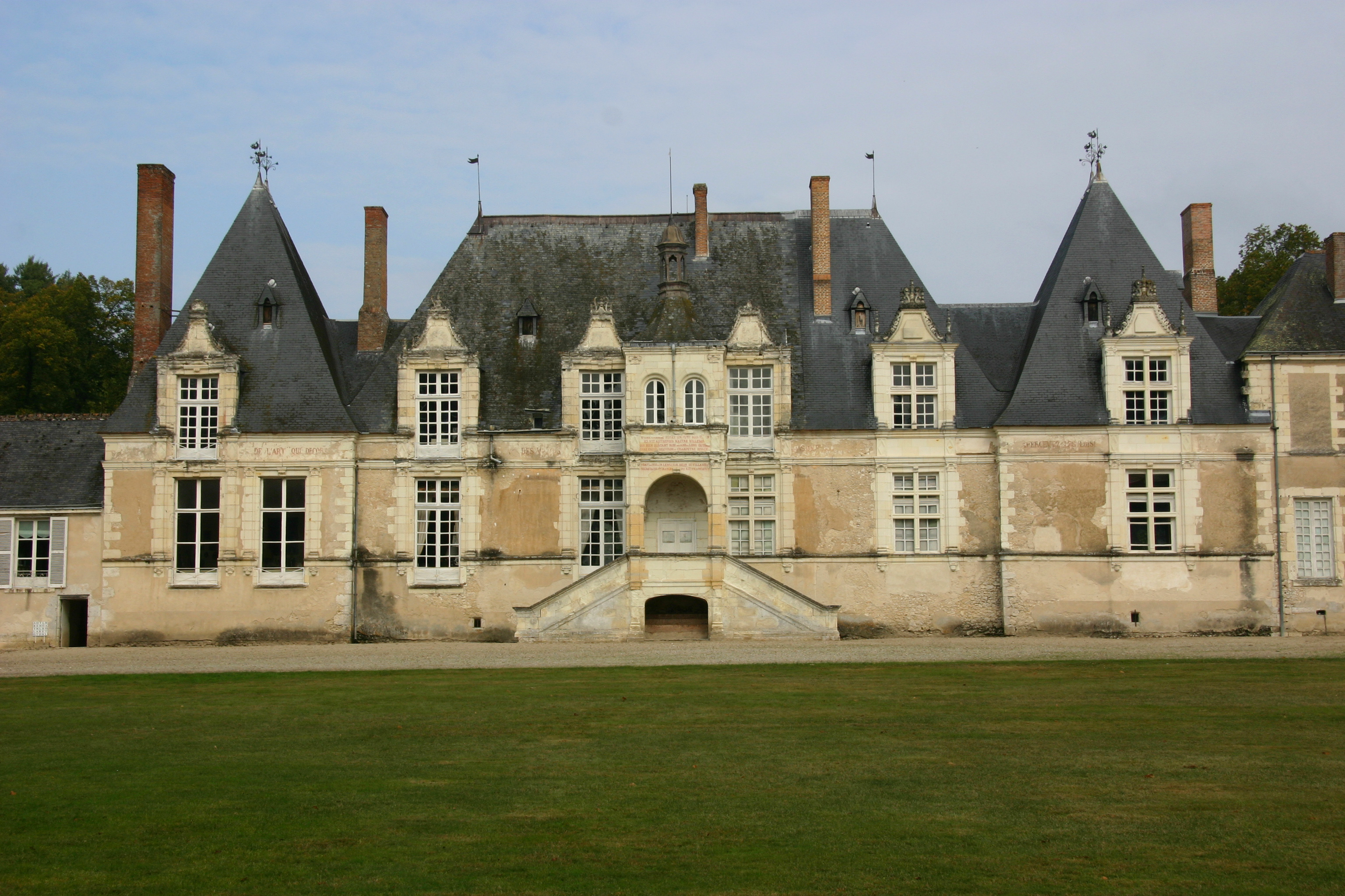 Château de Villesavin